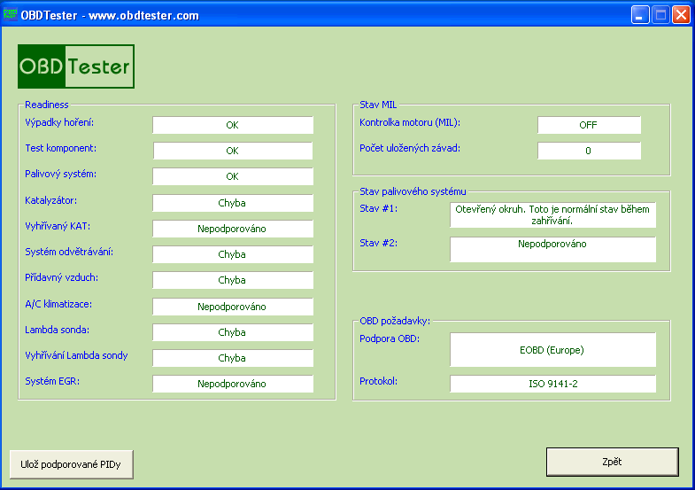 Zobrazeni stavu OBD-II v programu OBDTester